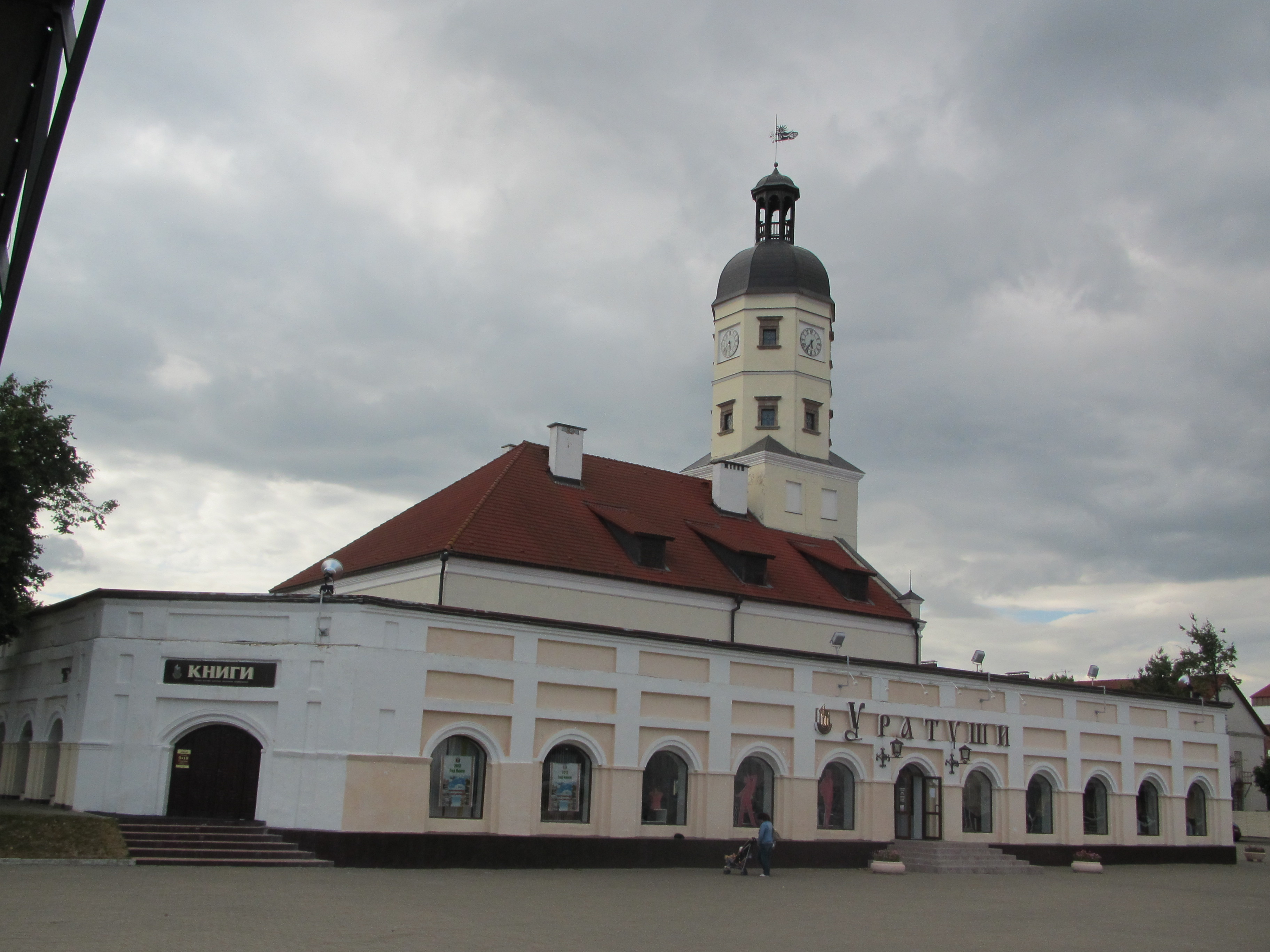 Беларуская (тарашкевіца): Гарадзкая ратуша з гандлёвымі радамі. г. Нясьвіж This is a photo of Belarusian heritage monument. Reference number: 611Г000474 ( WLM)